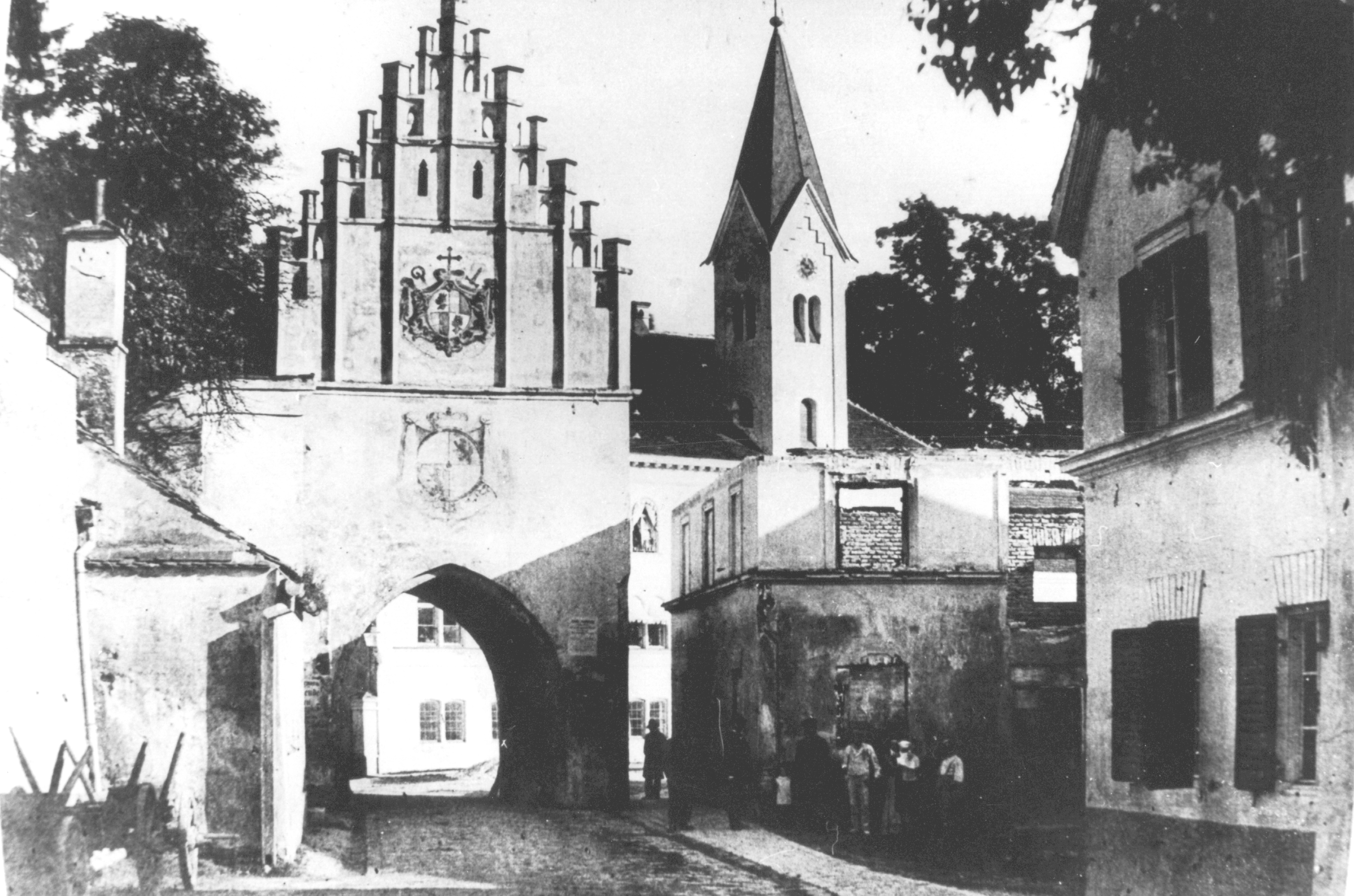 Münchner Tor in Freising von innen 1878